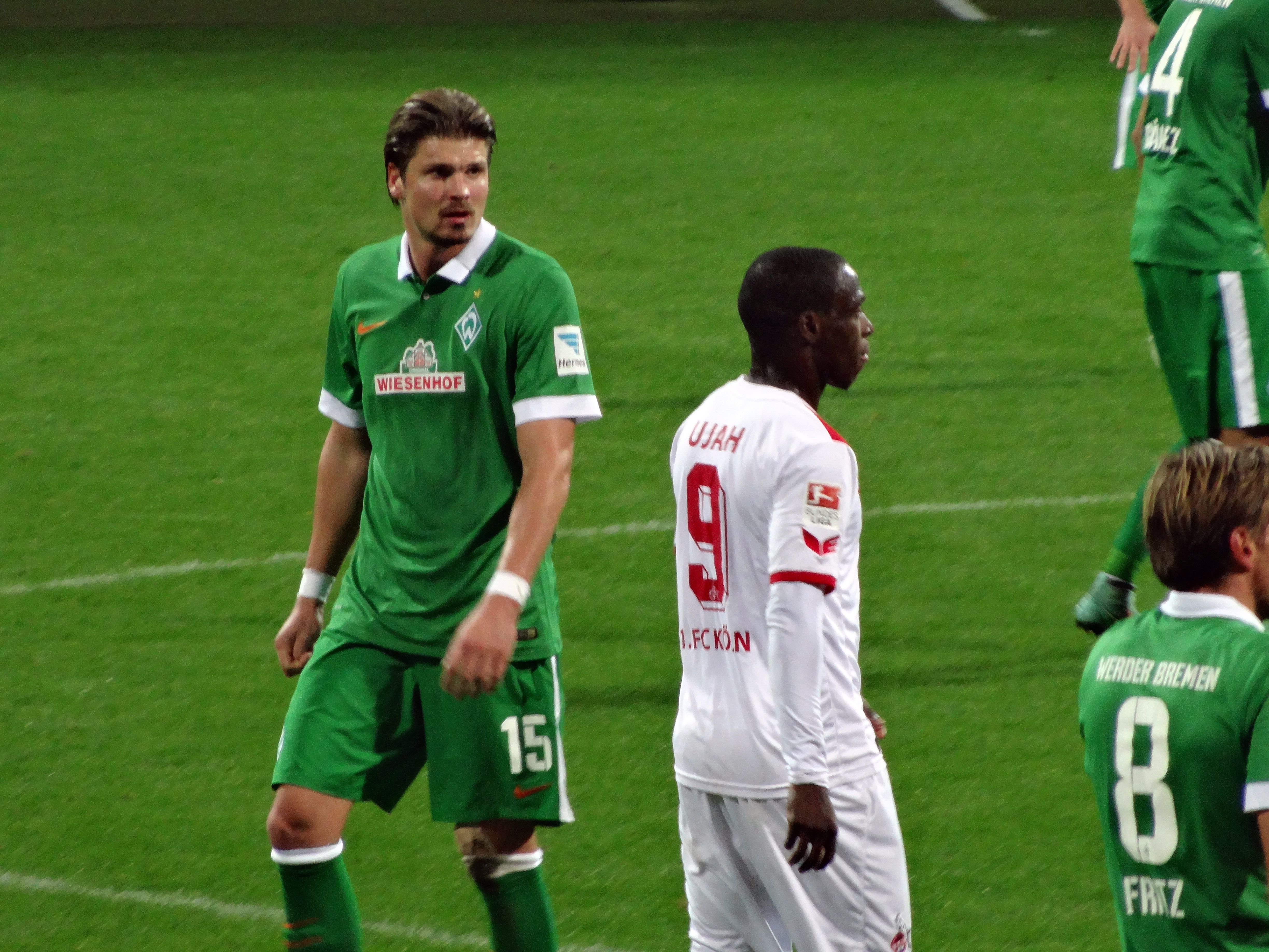 Sebastian Prödl Werder Bremen - 1. FC Köln 0:1 Weser Stadion, 24.10.2014 Deutsche Bundesliga